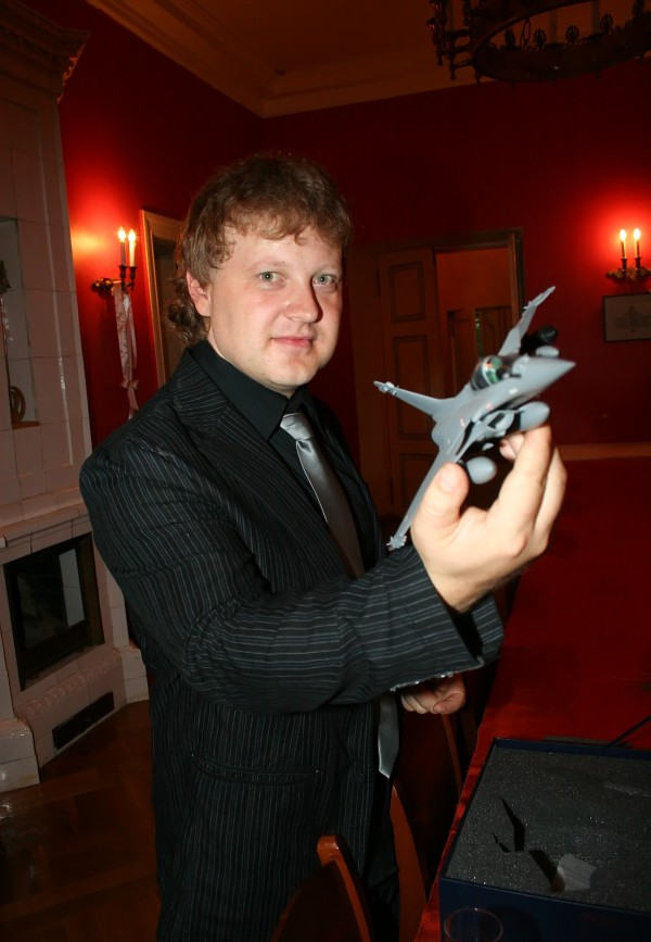 Свен Лыхмус на вечеринке в честь своего 35-летия